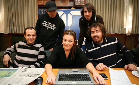 Los componentes de LODVG en un encuentro digital de 20 Minutos.